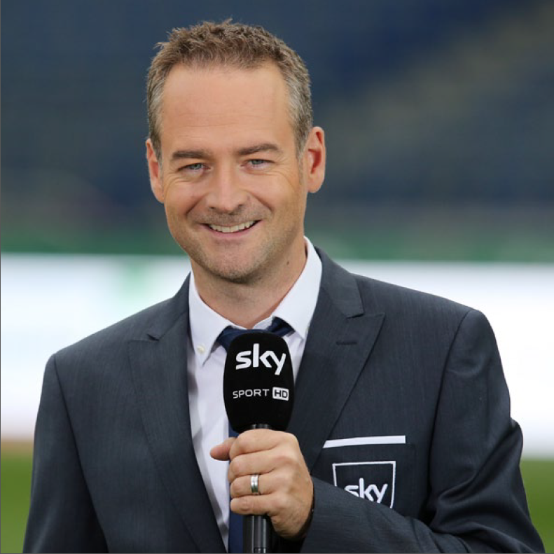 Bei Sky ist der Wahl-Münchner vielseitig im Einsatz. Neben „EinsEins – Das Standpunktgespräch“ ist er auch als Moderator und Field-Reporter bei Fußballspielen und als Kommentator im Fußball und bei den Wimbledon-Turnieren tätig.